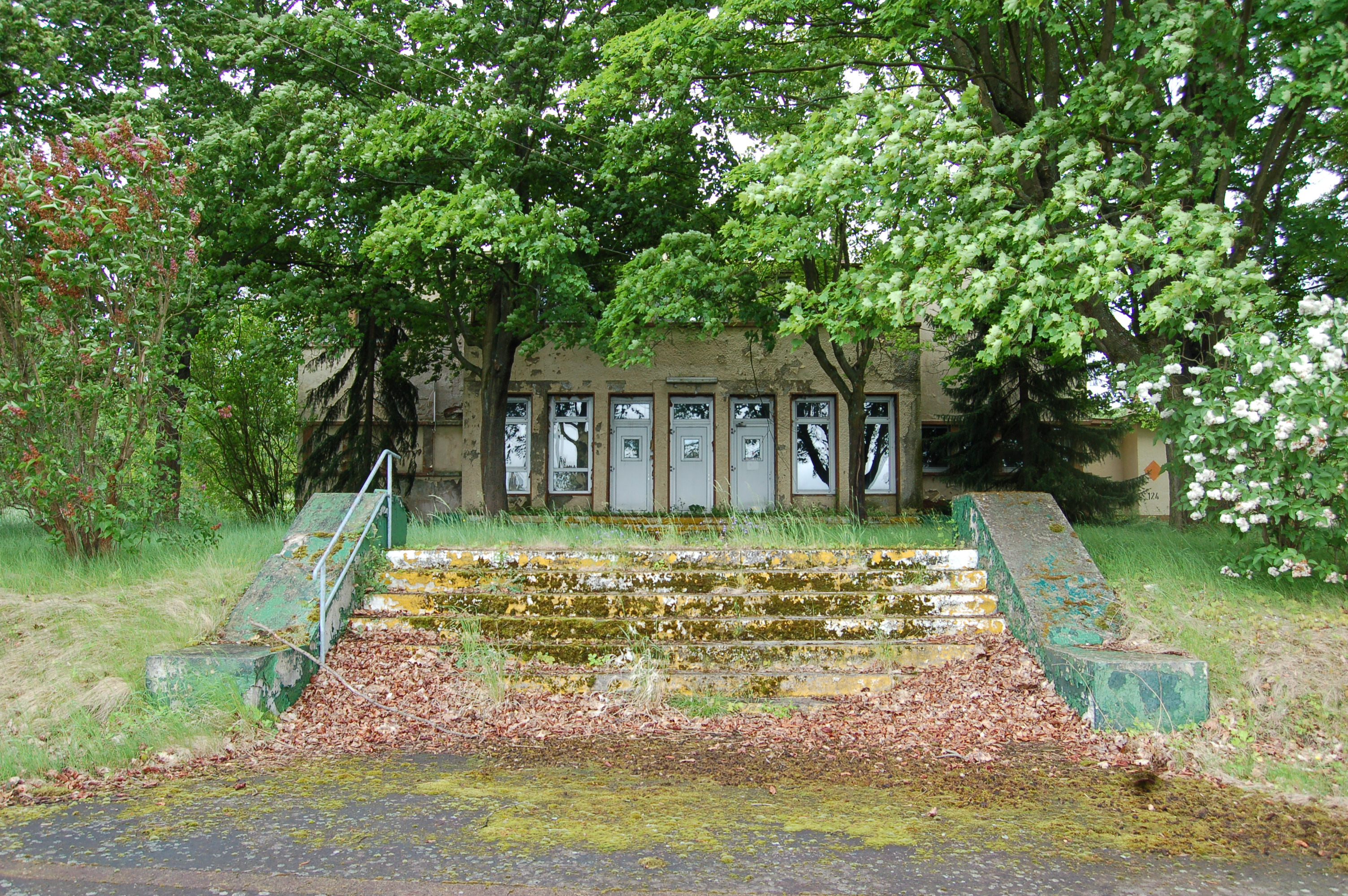 Flughafen Gießen